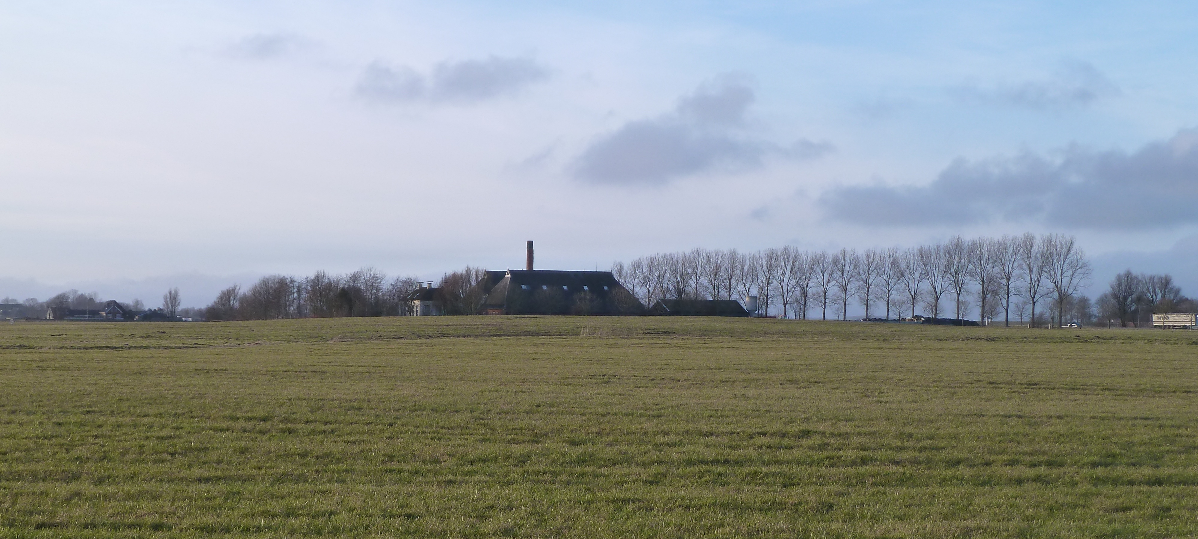 Wierde De Bouwerd gezien vanaf de landbouwweg naar het Stulpke